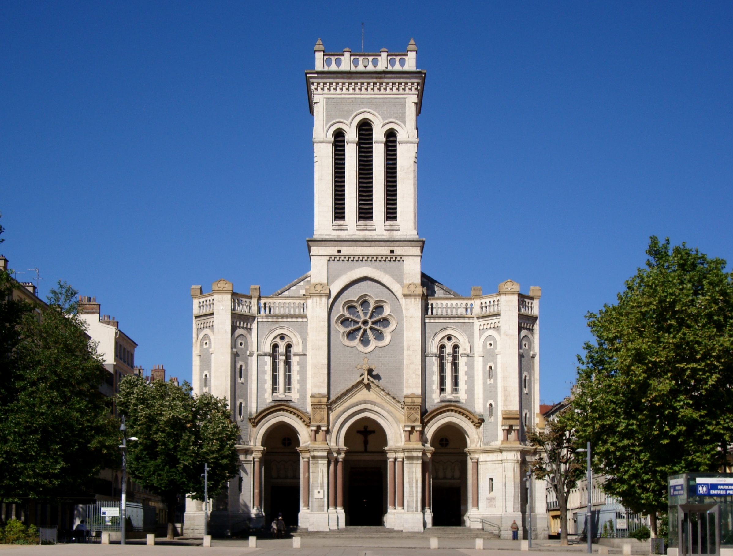 La cathédrale Saint-Charles-Borromée de Saint-Étienne dans la Loire.